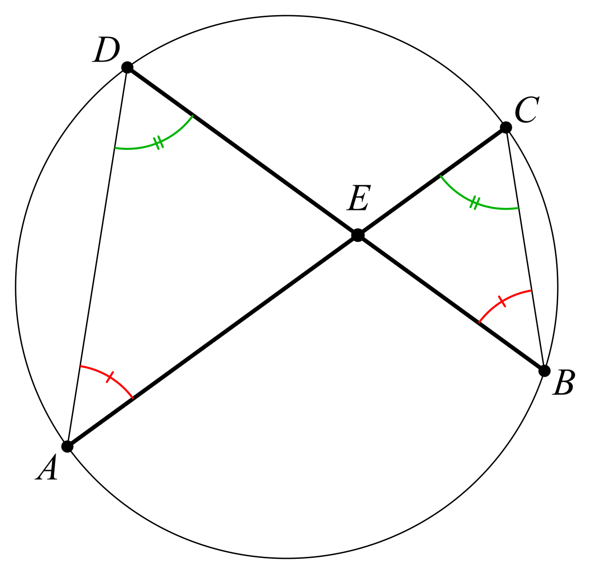 Kordasatsen